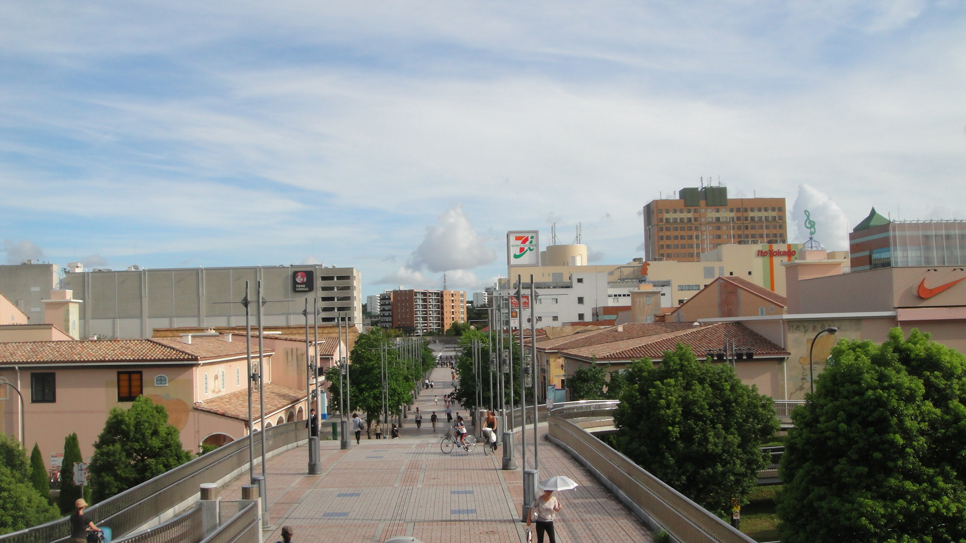 南大沢駅周辺を首都大前から望む